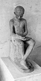 פסל ילד בחדר המדרגות של הבניין הישן של בית הספר א.ד.גורדון בתל אביב